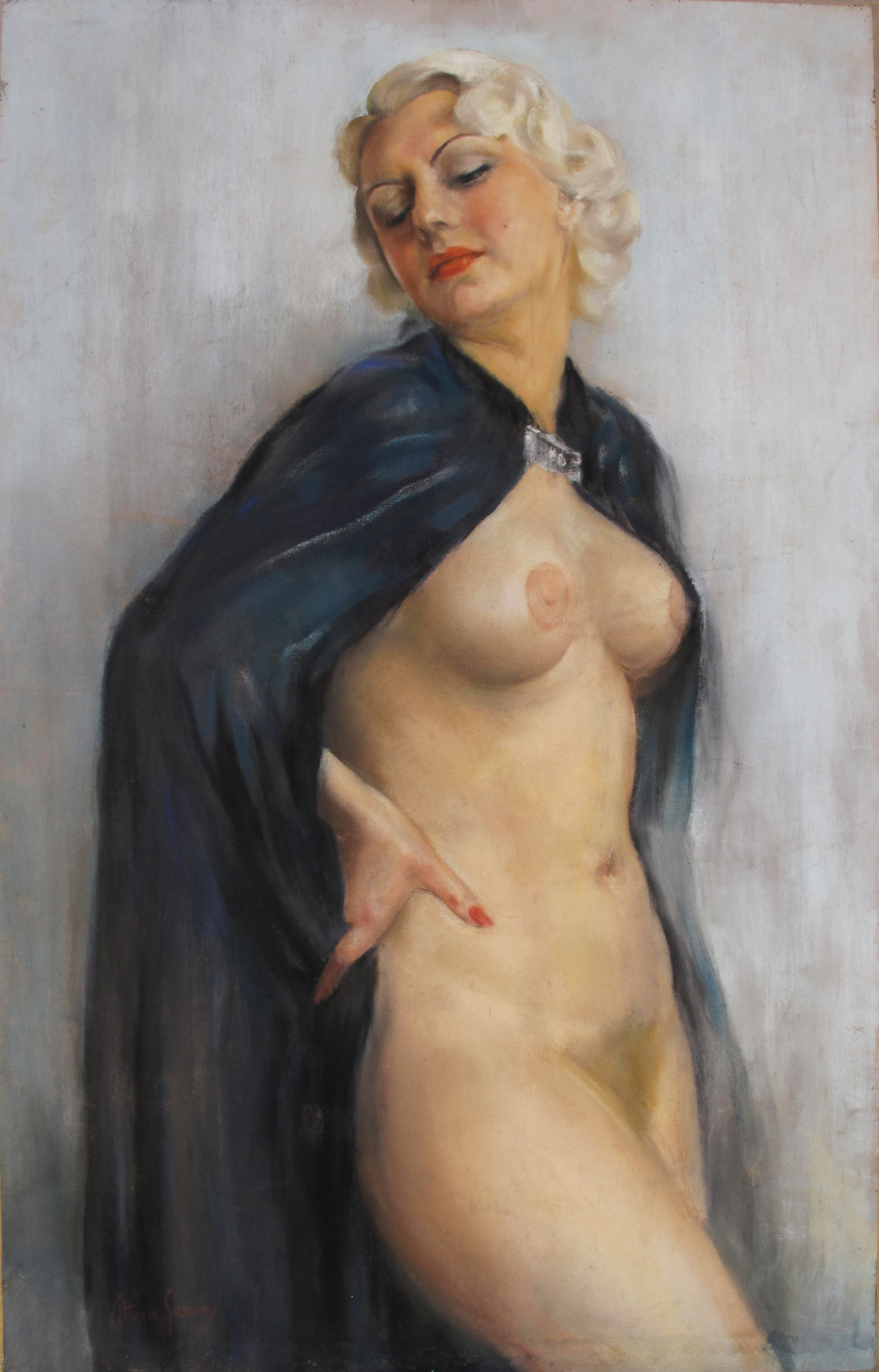 Nudo Femminile con mantello